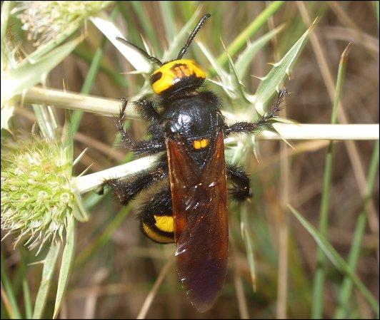 Femelle de Megascolia maculata sur un Panicaut